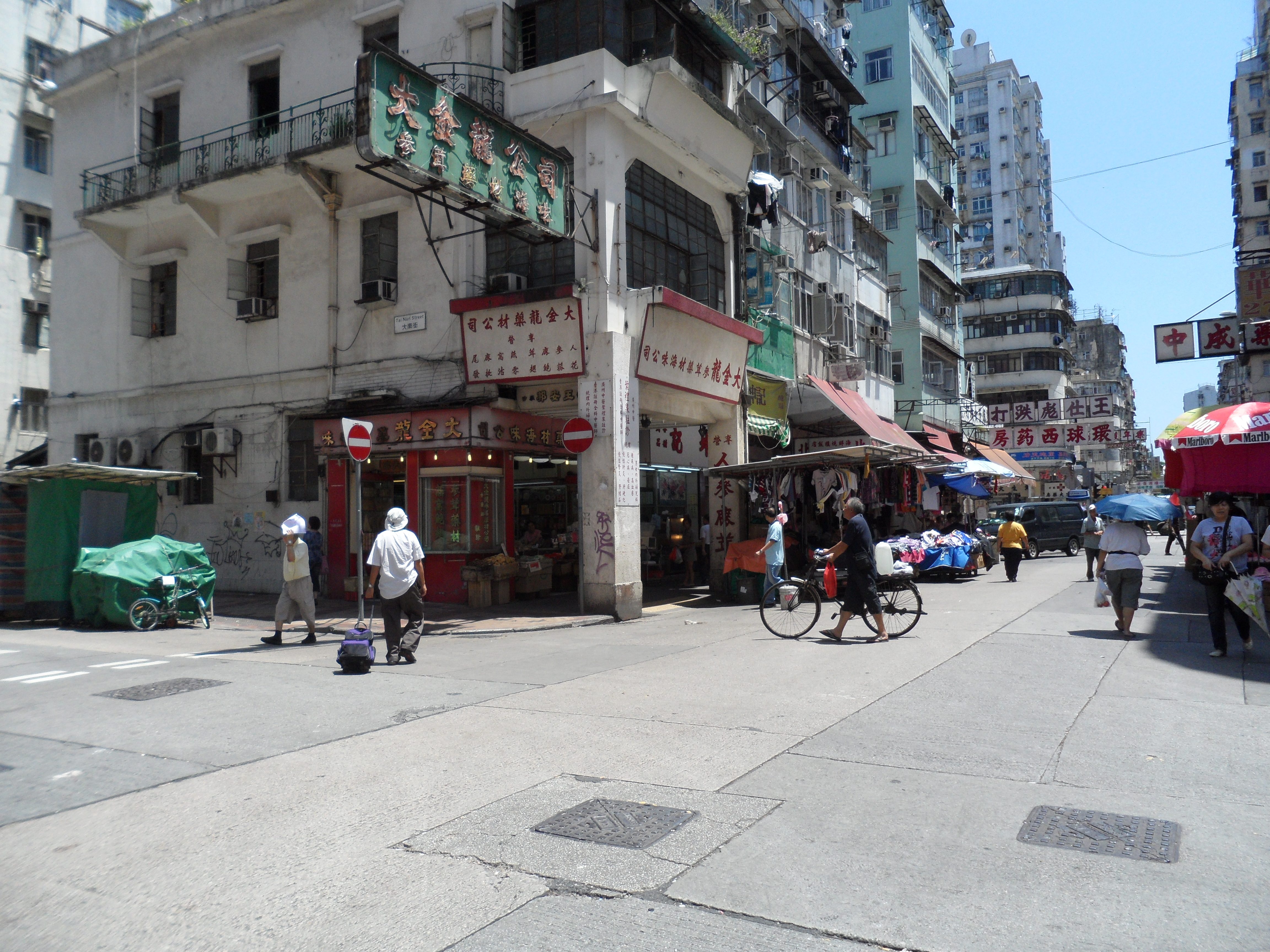 大南街與北河街交界 No.58 Pei Ho Street, a Verandah Type Shophouse, at the corner of Tai Nan Street